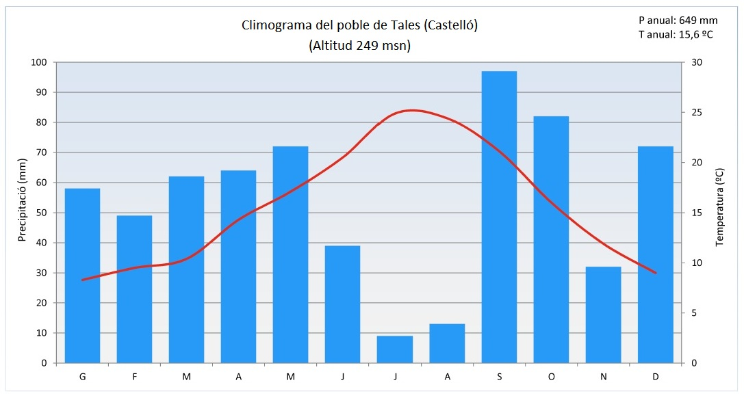 Climograma del pueblo de Tales (Castellón). Las precipitaciones y la temperatura media mensuales estan representadas de manera habitual.